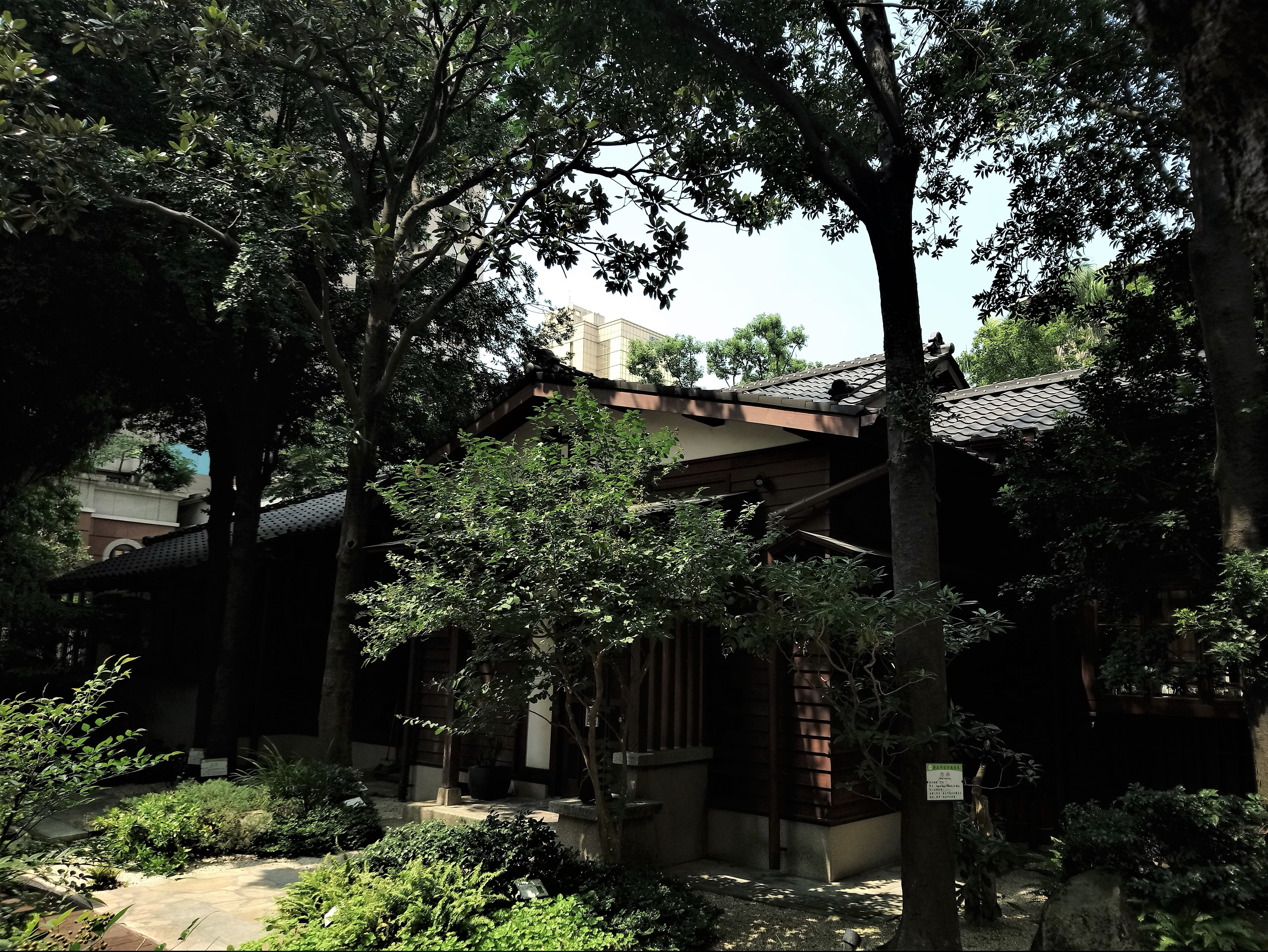 文房Chapter,臺北市中正區東門次分區幸市里